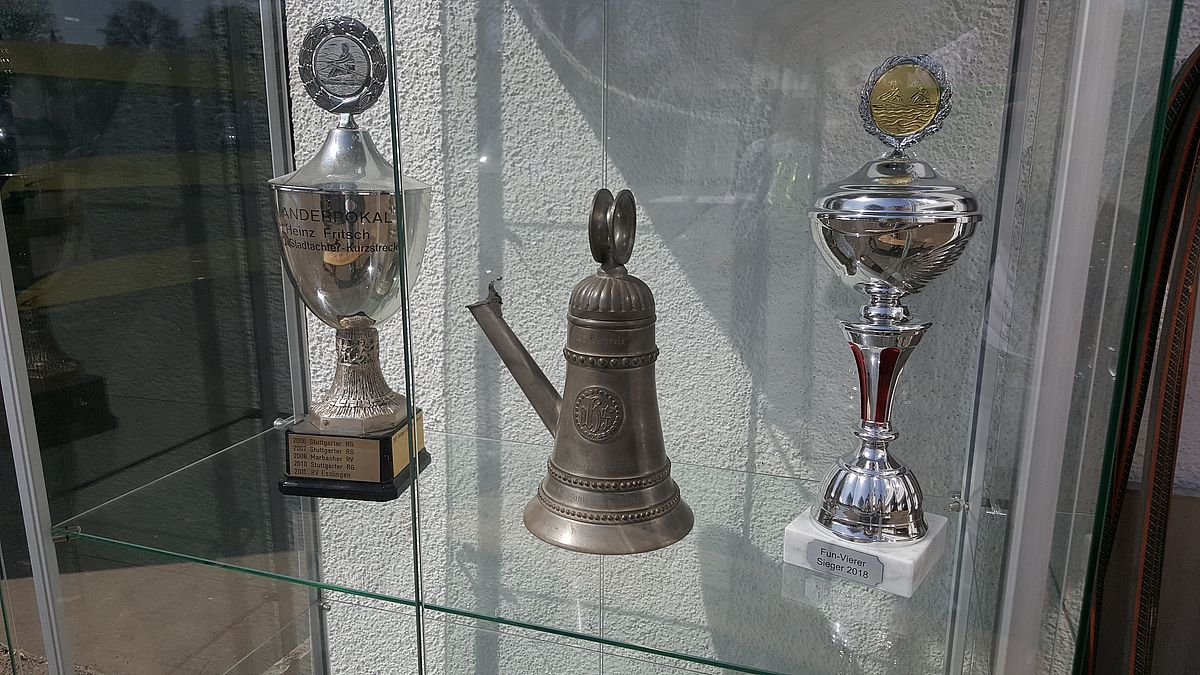 Stuttgart-Cannstatter-Ruderclub von 1910. „Cannstatter Kanne“ und im Sprint den „Heinz-Fritsch-Pokal“ als Wanderpreis